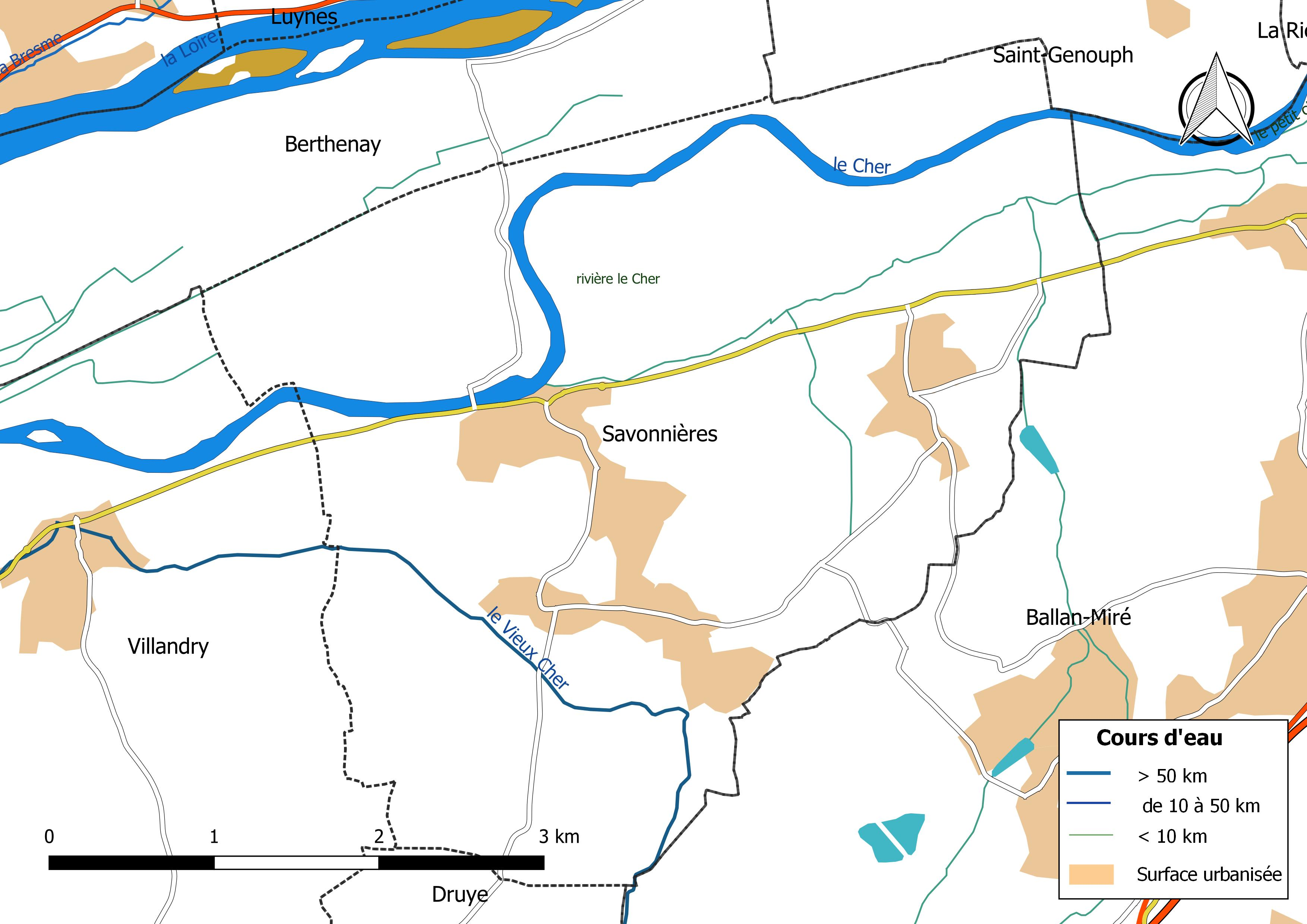 Carte du réseau hydrographique de la commune de Savonnières (France).